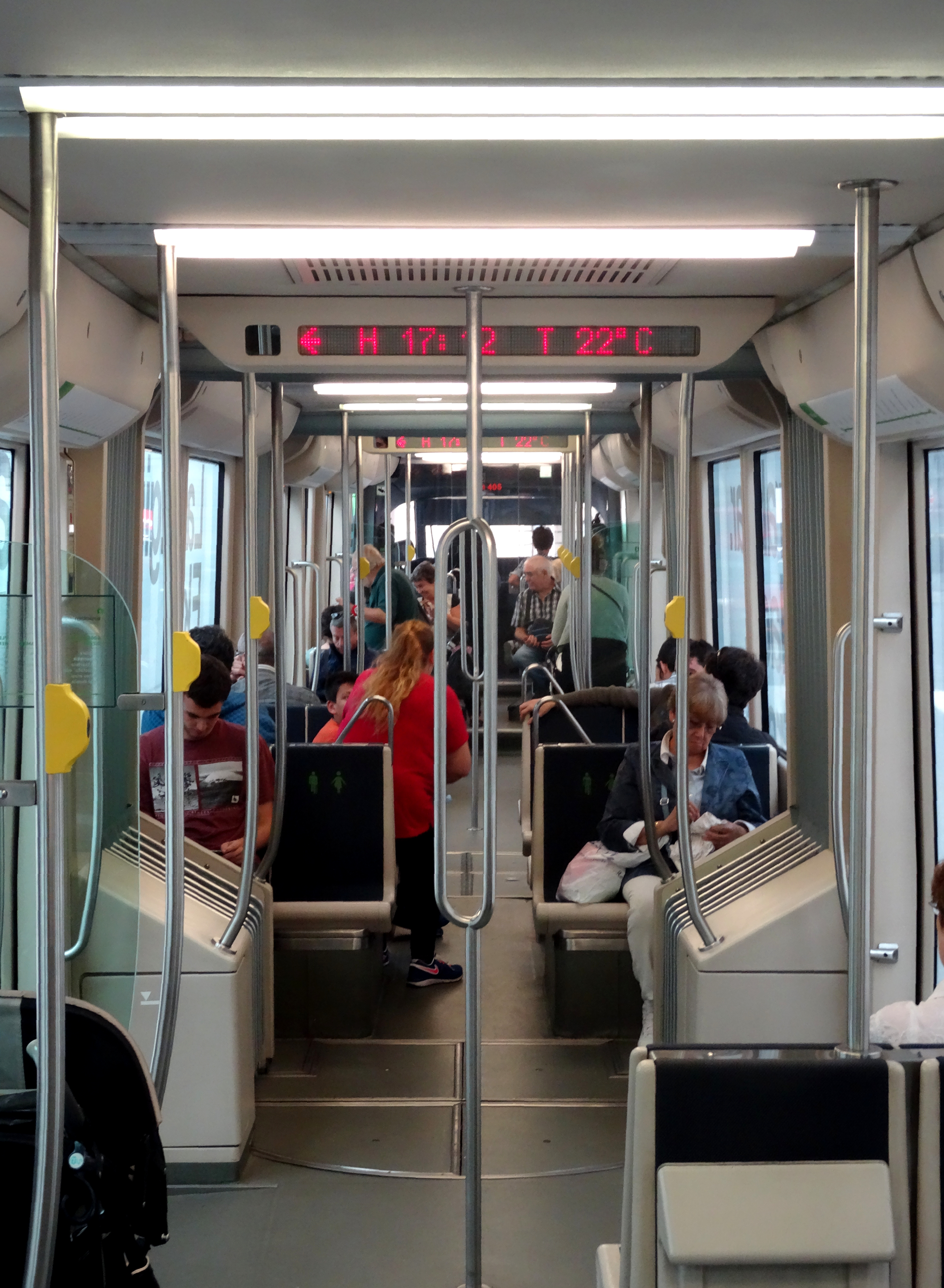 Tram in Bilbao / Straßenbahn Bilbao